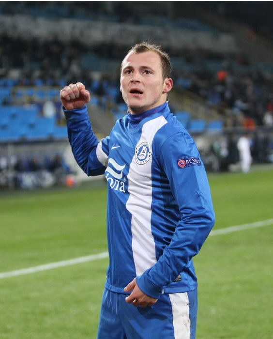 Роман Зозуля празднует гол в ворота ФК Пандурий